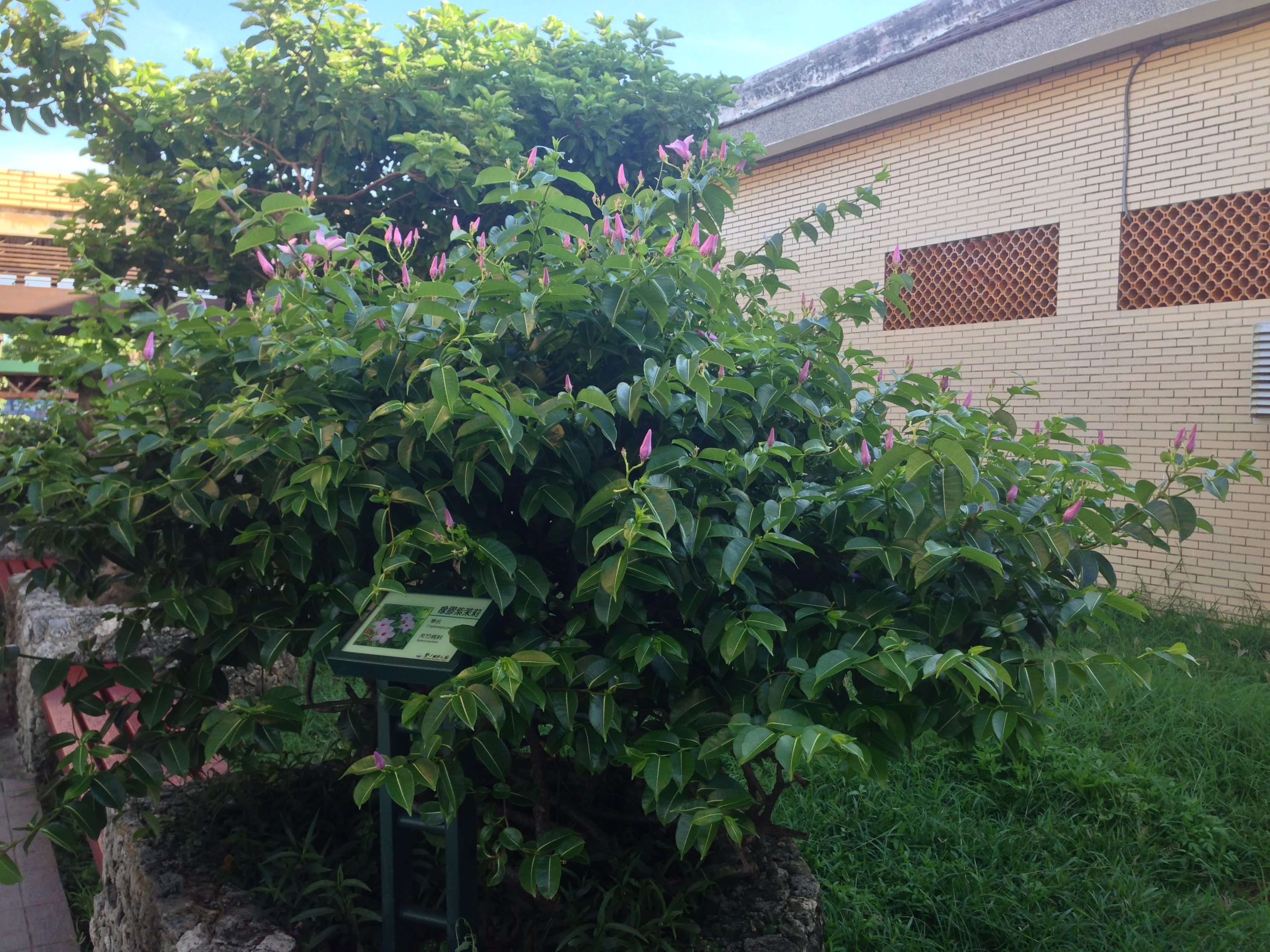 貓鼻頭公園橡膠紫茉莉